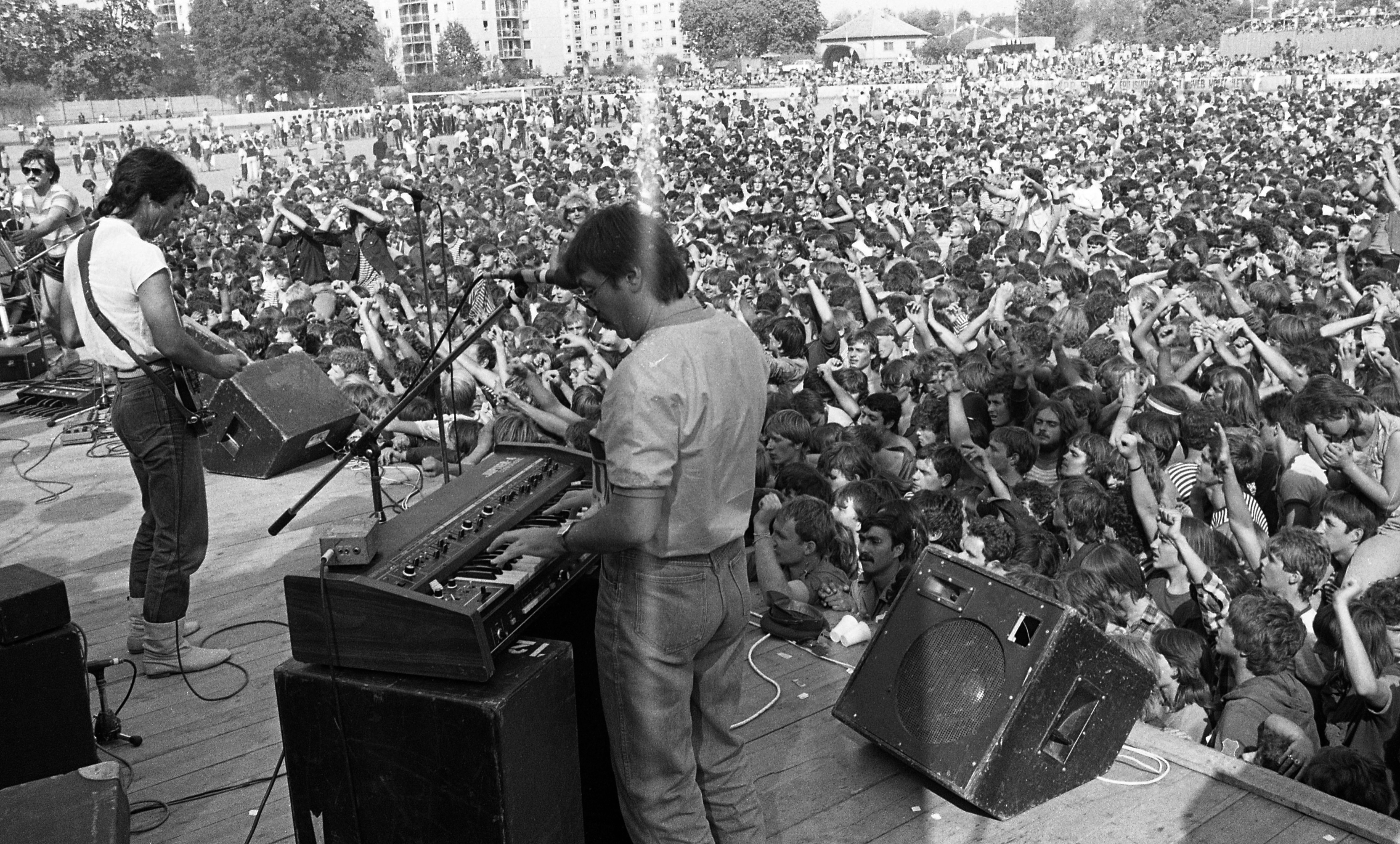 Népkerti pálya, Jubileumi Rockfesztivál, gitárral Szűcs Antal Gábor. Location: Hungary Tags: stage, musical instrument, guitar, synthesizer, microphone, audience Title: Népkerti pálya, Jubileumi Rockfesztivál, gitárral Szűcs Antal Gábor.